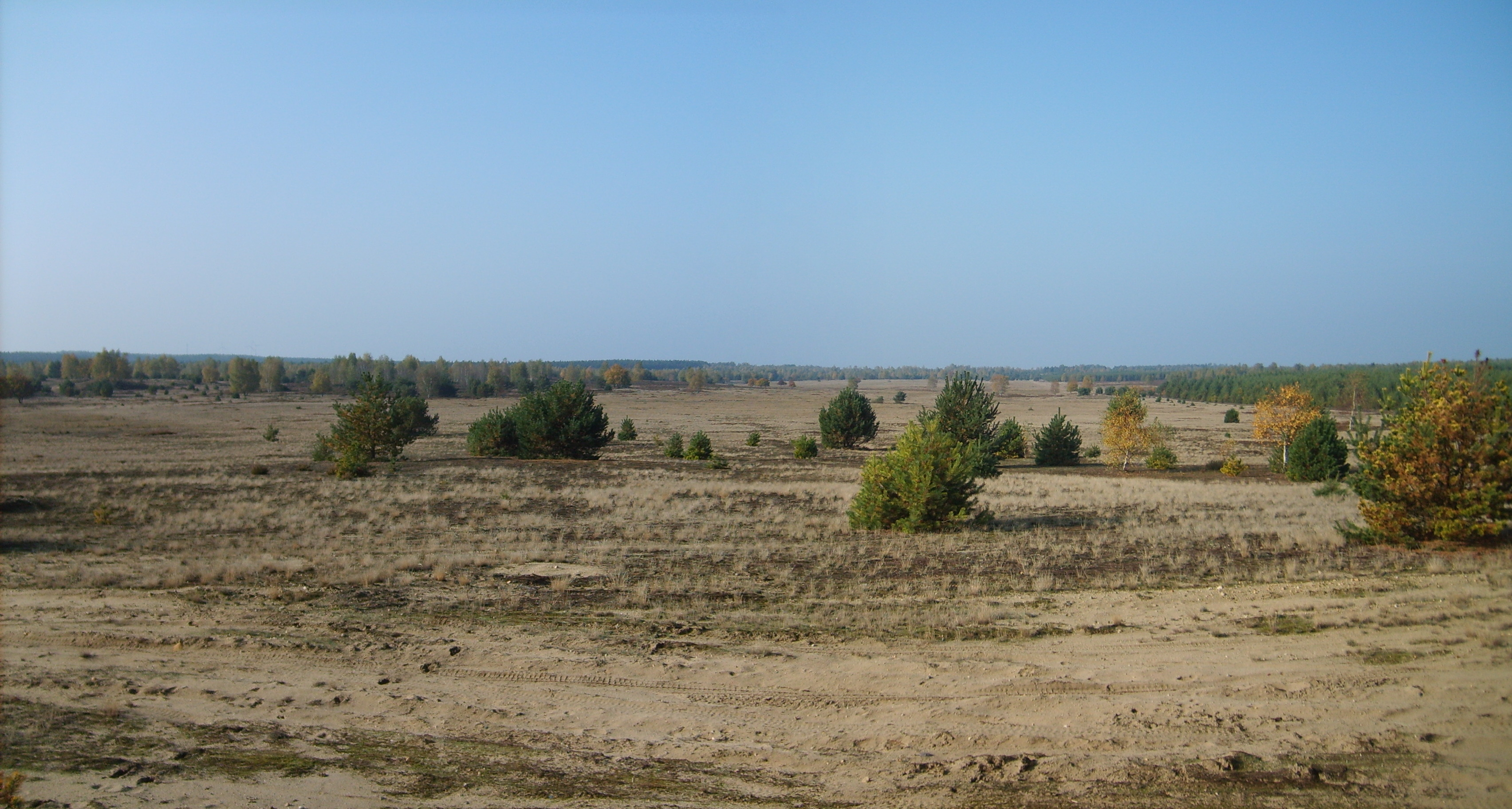 NSG Forsthaus Prösa